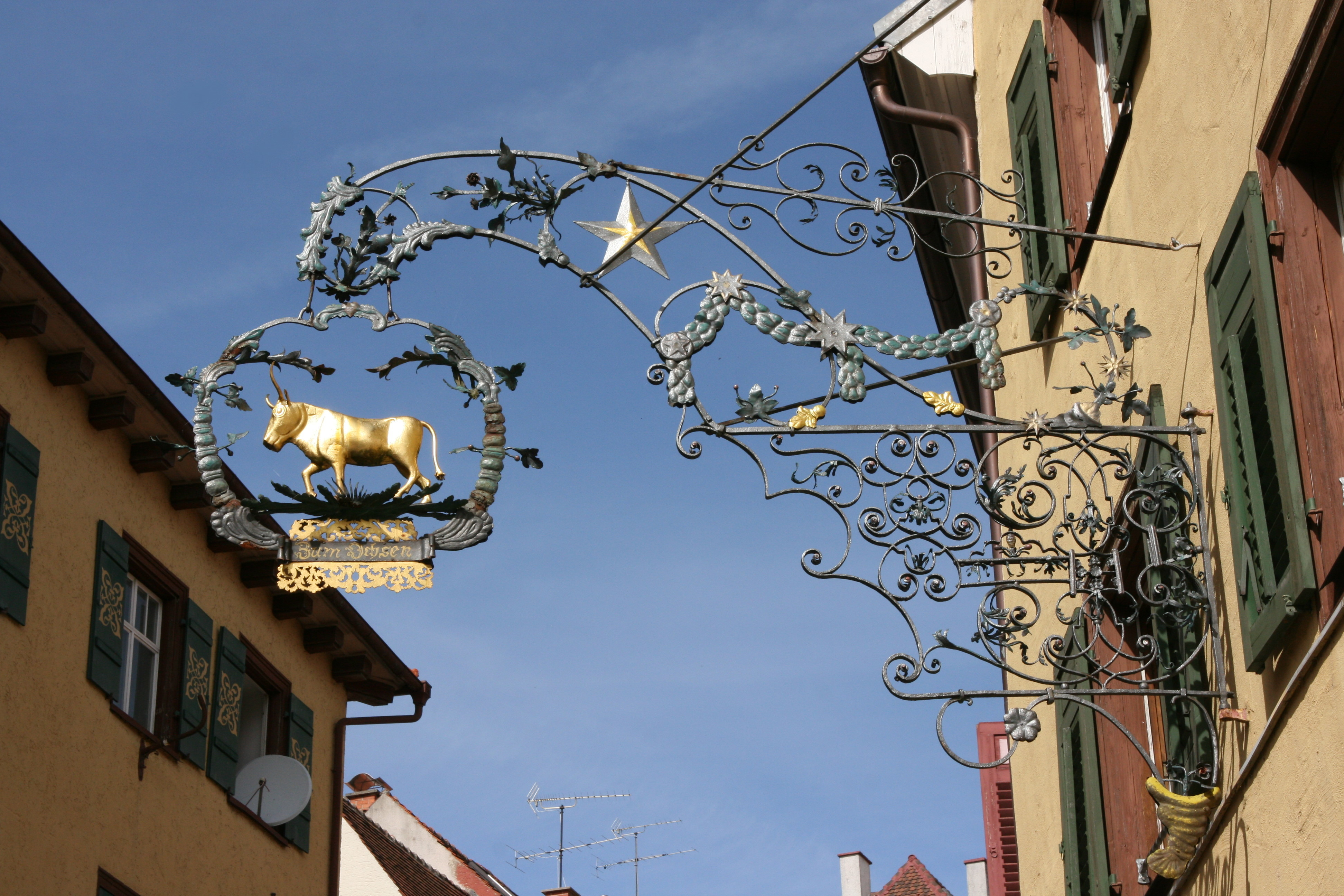 “Ochsen”, 1471 erwähnt als Stadthaus der Freiherren von Reischach, Ende des 16. Jahrhunderts im Besitz der Familie Vogler, im 19. Jahrhundert umfangreiche Umbauten und Einrichtung des Gasthausen "Ochsen", seit Mitte des 20. Jahrhunderts Wohnhaus, Hauptstraße in Engen